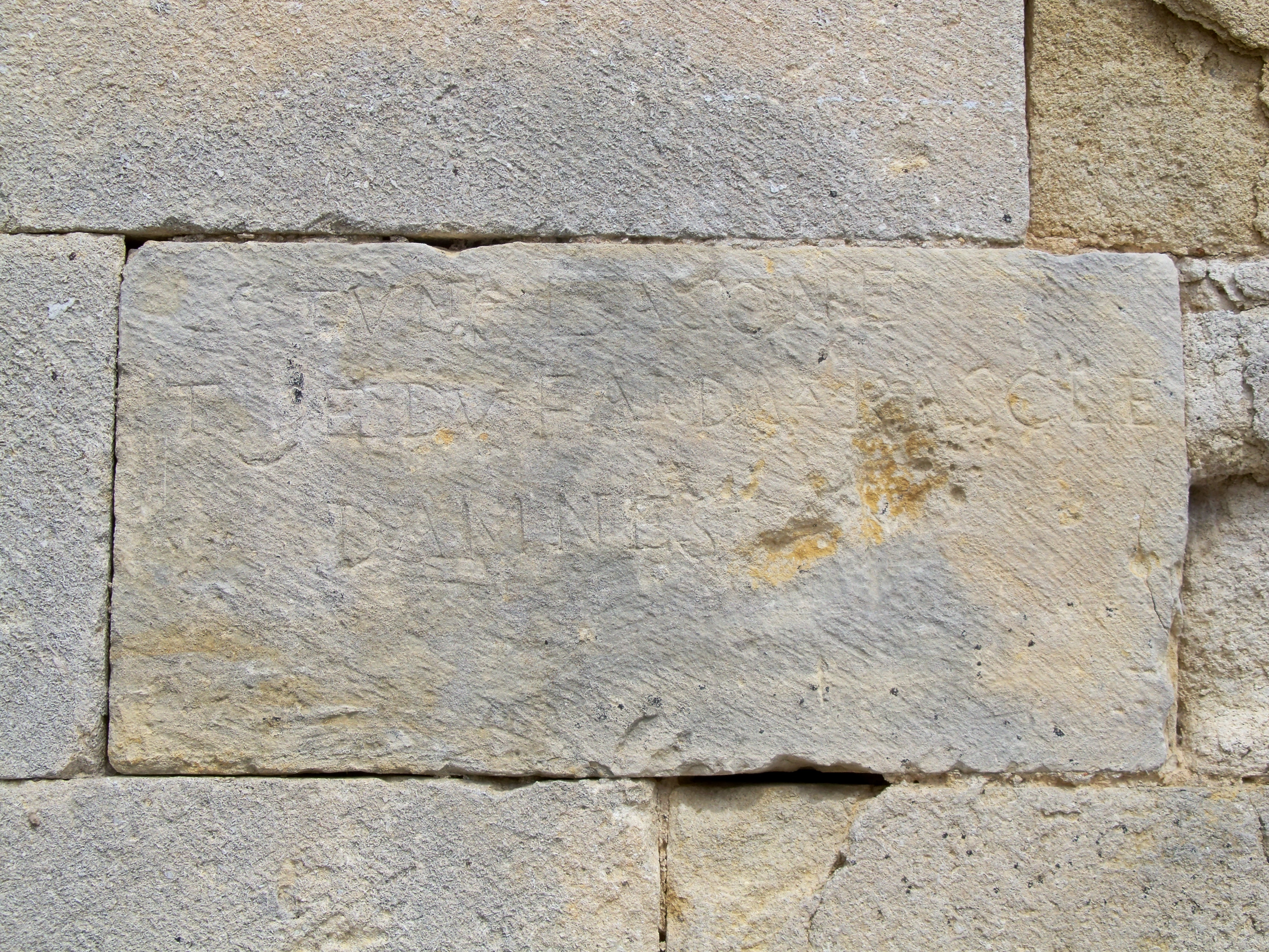 Chapelle Saint-Sixte d'Aubignan, Route de Caromb (Inscrit, 1984) .